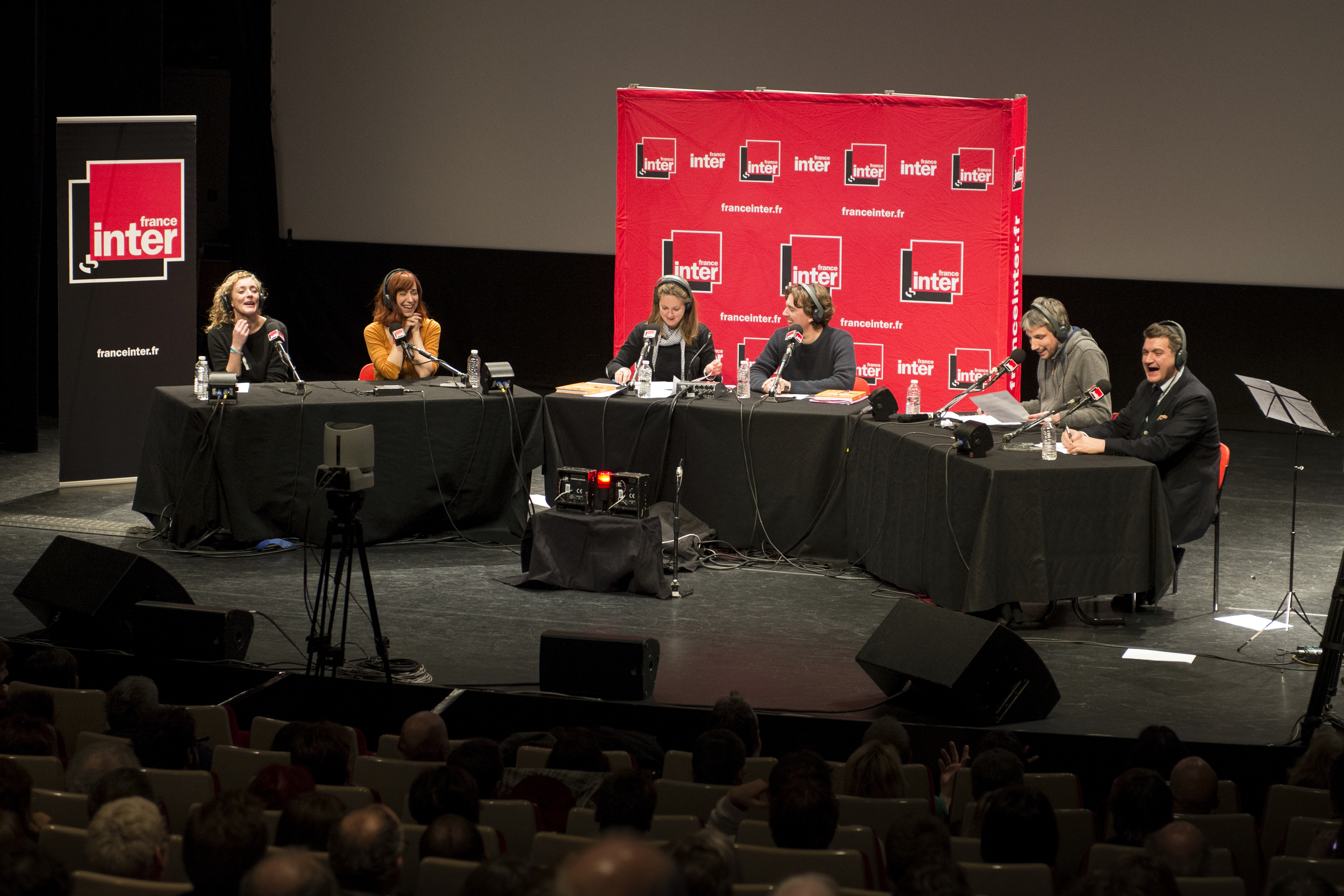 Emission Si tu écoutes, j'annule tout de France Inter enregistrée en direct de l'espace Franquin, Festival International de la Bande Dessinée d'Angoulême 2017.